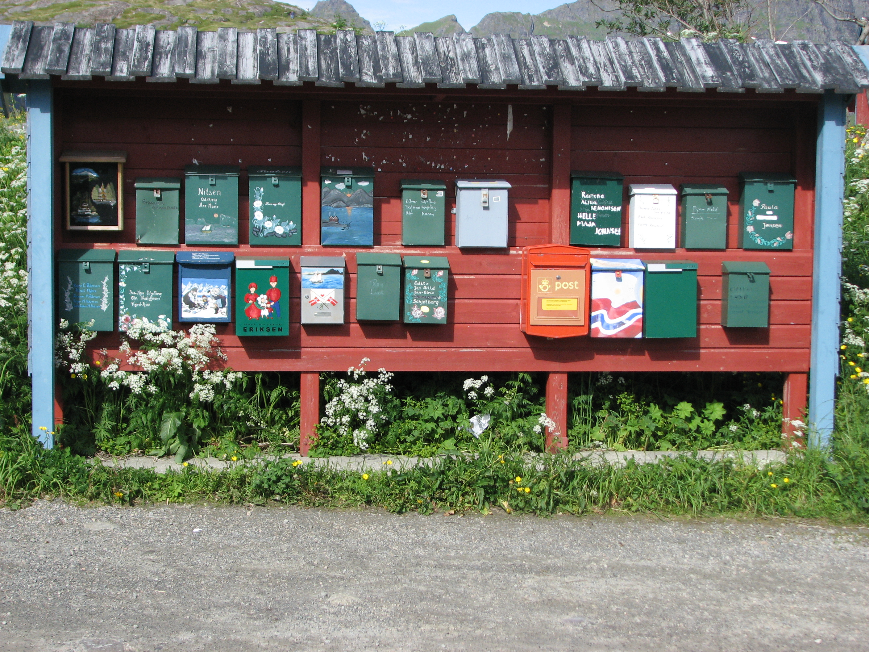 Å, Moskenes; Norway